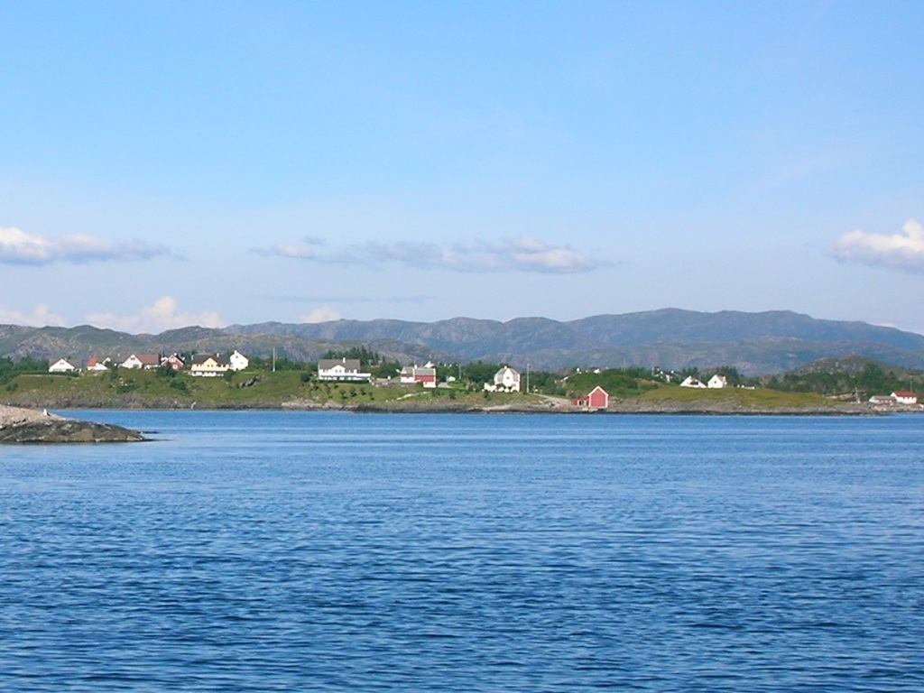 Byrknesøy in Gulen, Norway. Byrknes seen from west. Picture taken by Gunnar Buvik 2006-07-20